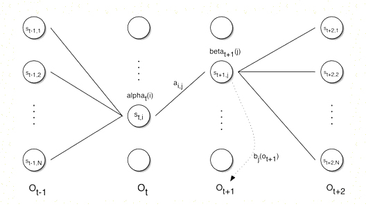 شکل6: باز تخمین احتمالات انتقال